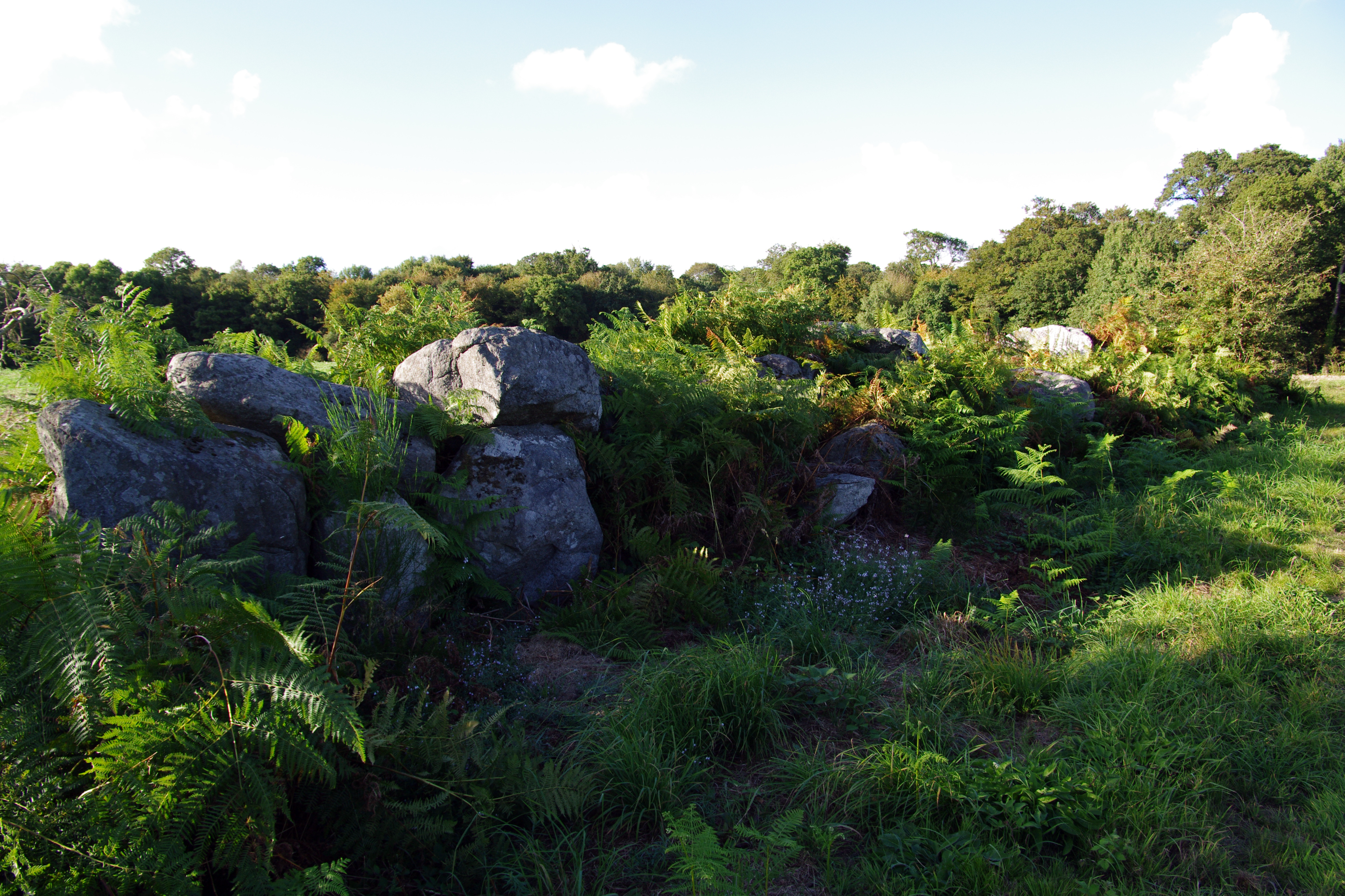 Allée couverte et alignement de menhirs indicateurs de Saint-André, (Classement, 1970)